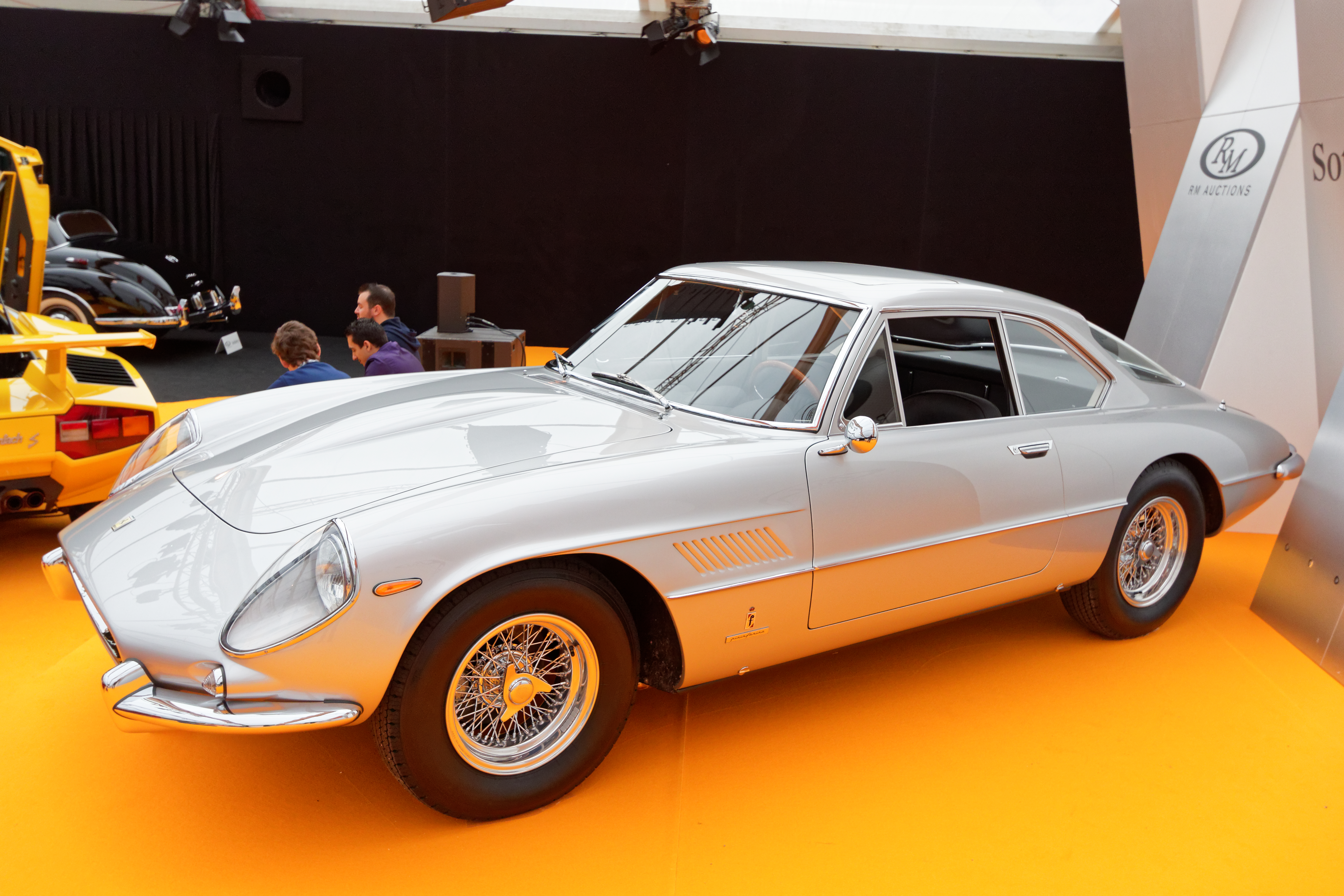 Une Ferrari 400 Superamerica LWB Coupé Aerodinamico de 1962 exposée lors de la vente RM Sotheby’s 2016 aux Invalides à Paris.